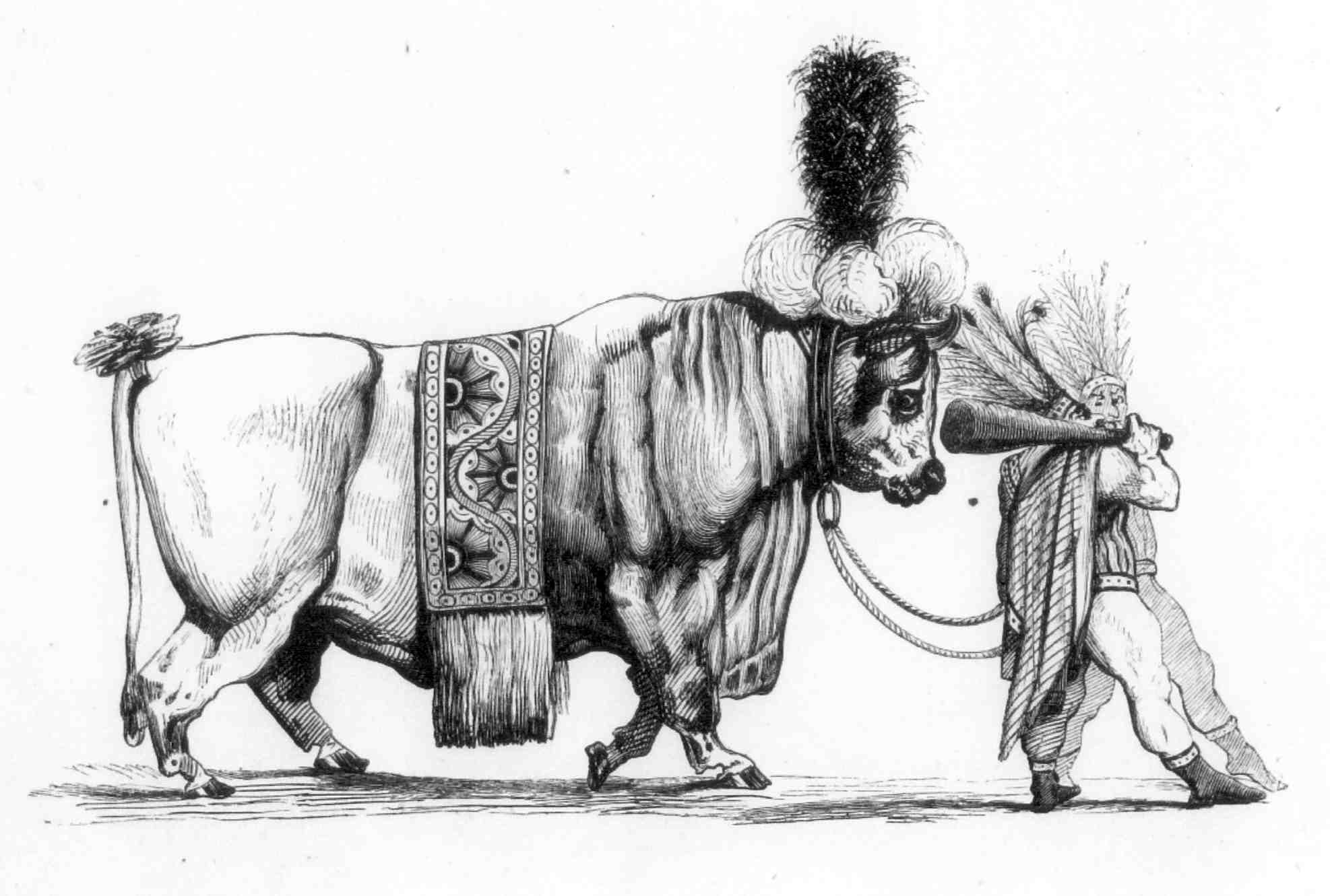 Le Bœuf Gras conduit par ses sacrificateurs, illustration du Carnaval de Paris.